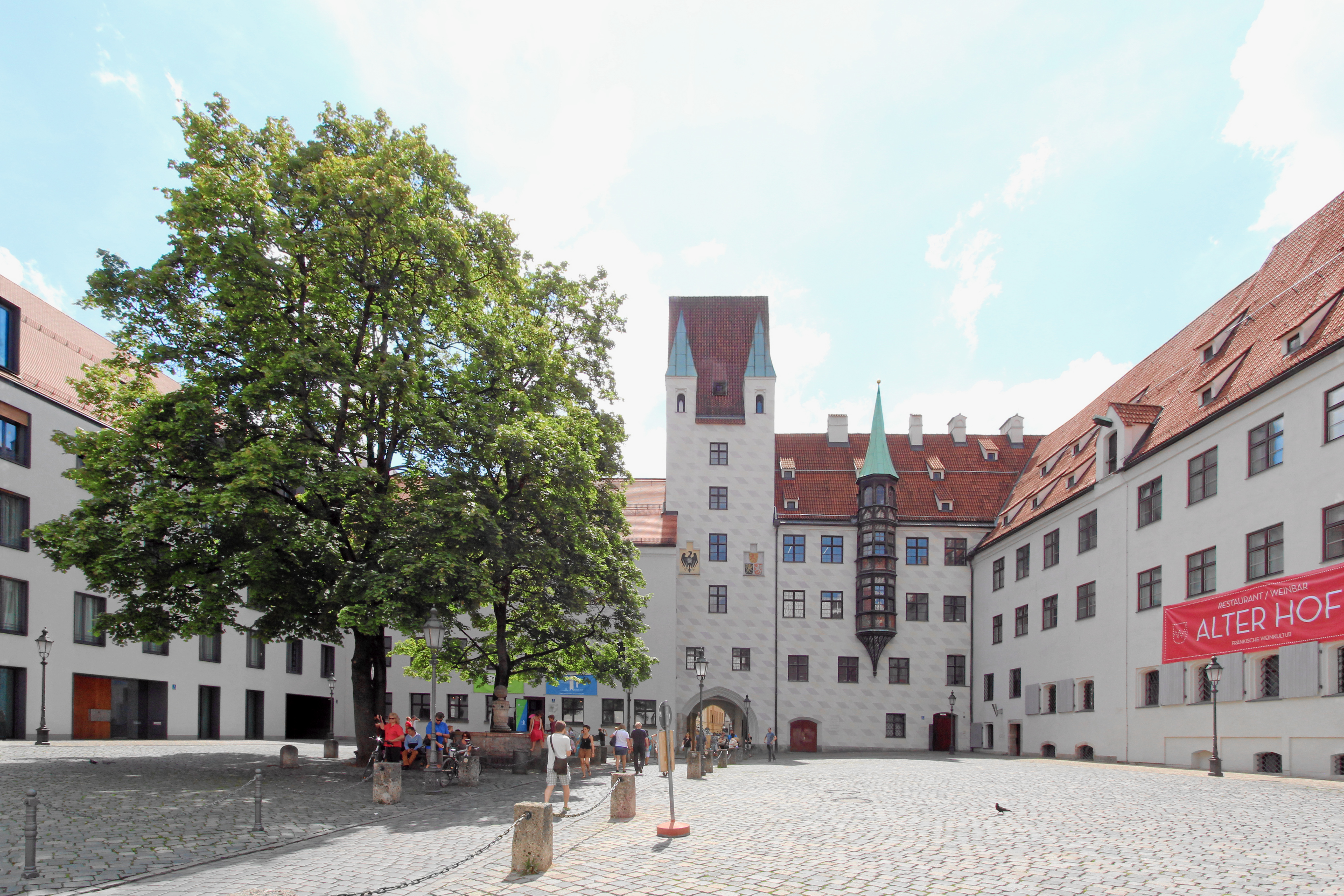 Der Alte Hof, 2014